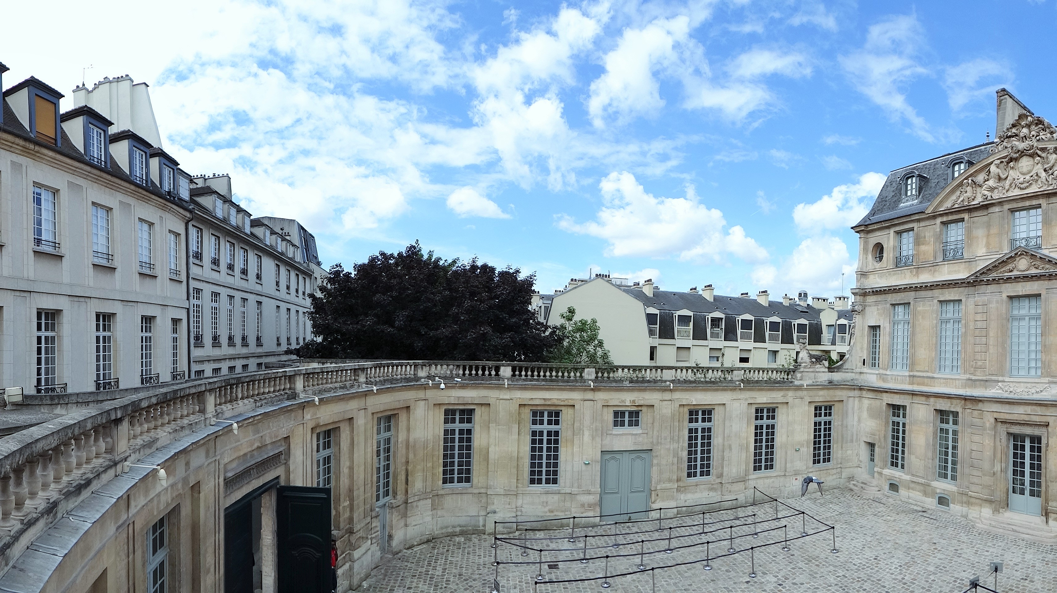 cour de l'Hôtel Salé, Paris 3e, Musée Picasso .